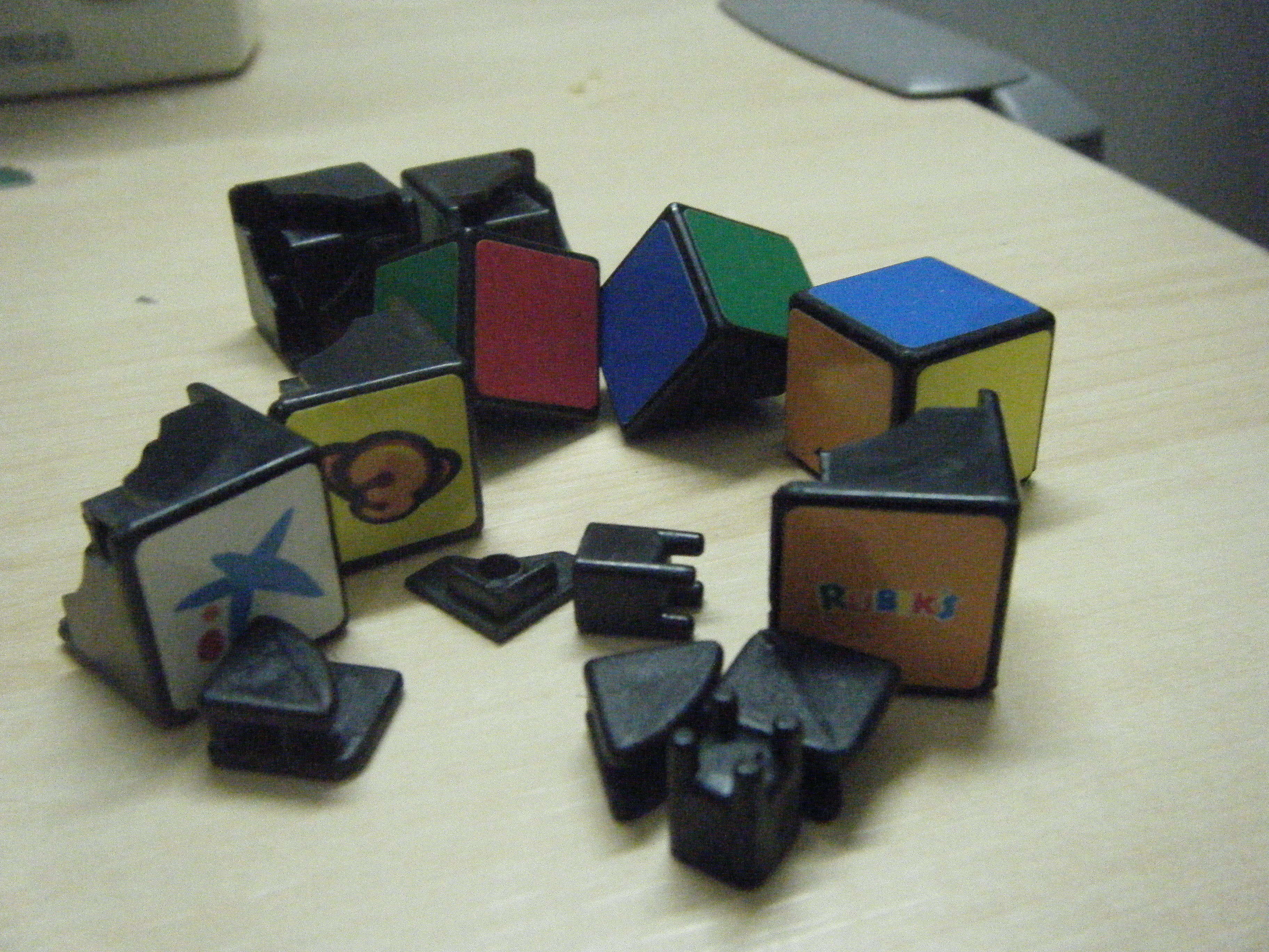 Algunes parts d'un cub de Rubik romput, per problemes amb la càmera no n'estic segur de la data.